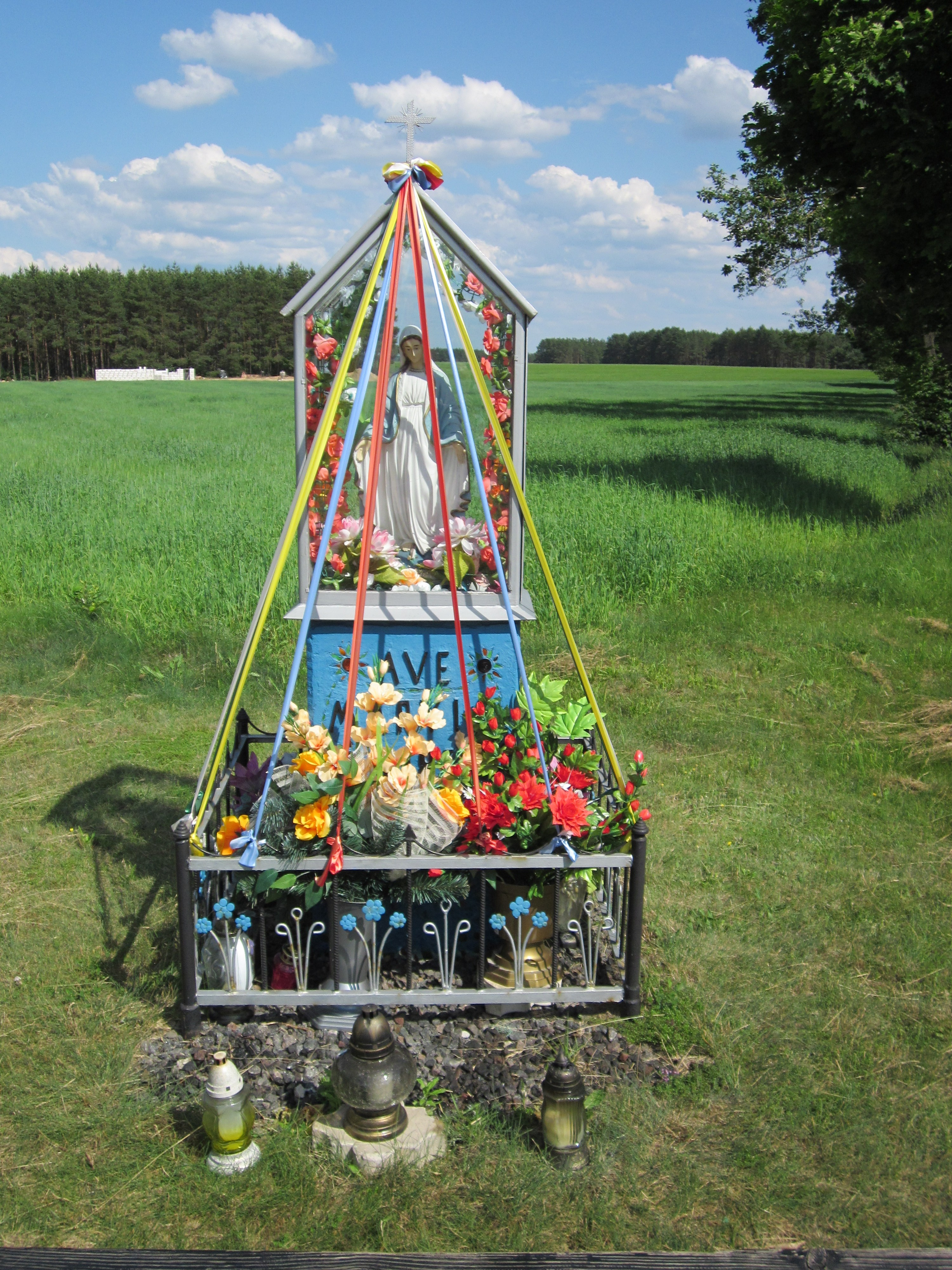 Kapliczka przydrożna (m. Czechowizna - Dk 65)